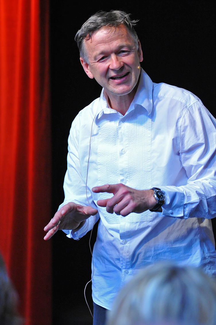 Christian von Richthofen bei einem Auftritt im Scharlatan Theater in Hamburg.